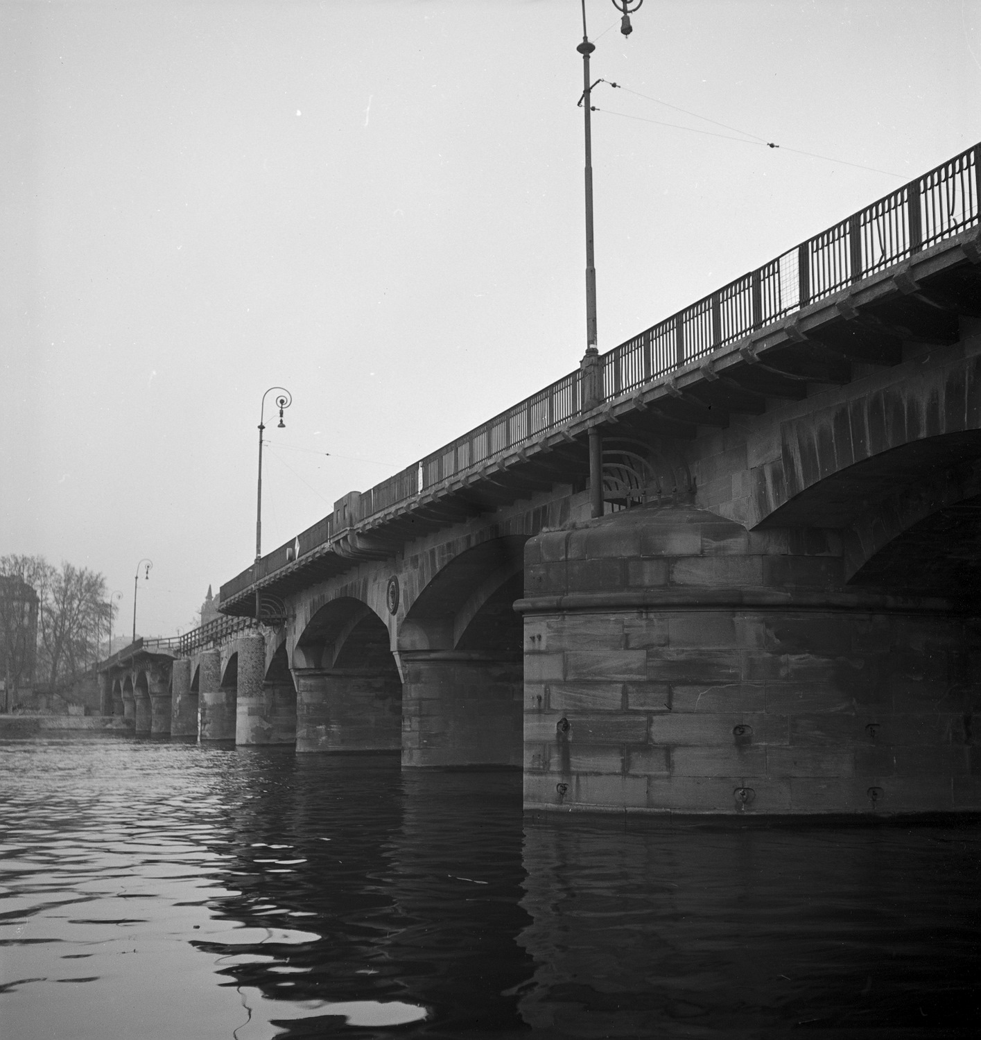 Die Wilhelmsbrücke in Frankfurt am Main, unmittelbar vor ihrem Abriss im Jahr 1950. Blick vom Sachsenhäuser Ufer aus nach Norden.